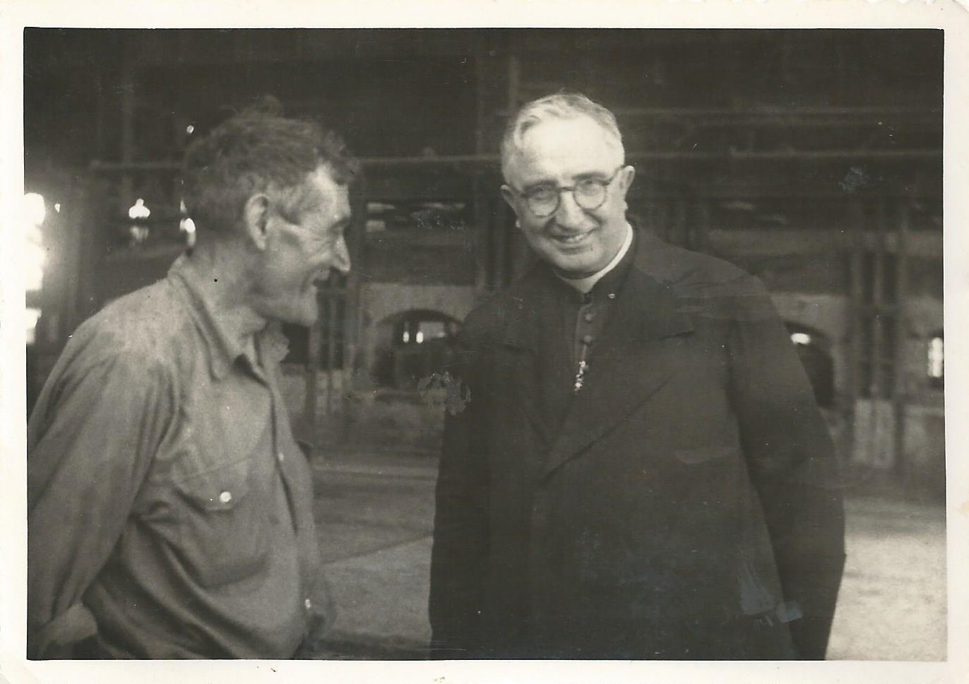 Arzobispo Marcelino Olaechea